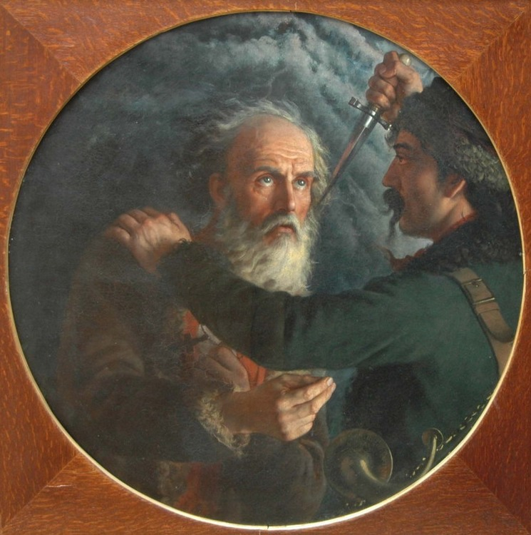 Ivan Susanin